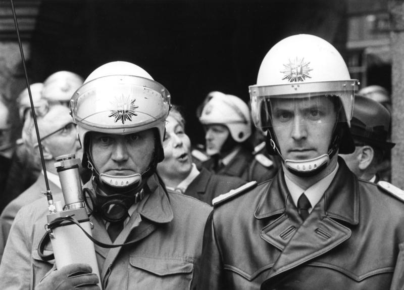 1969 Wahlkampfreise Bundeskanzler Kurt Georg Kiesinger Polizei Einsatz